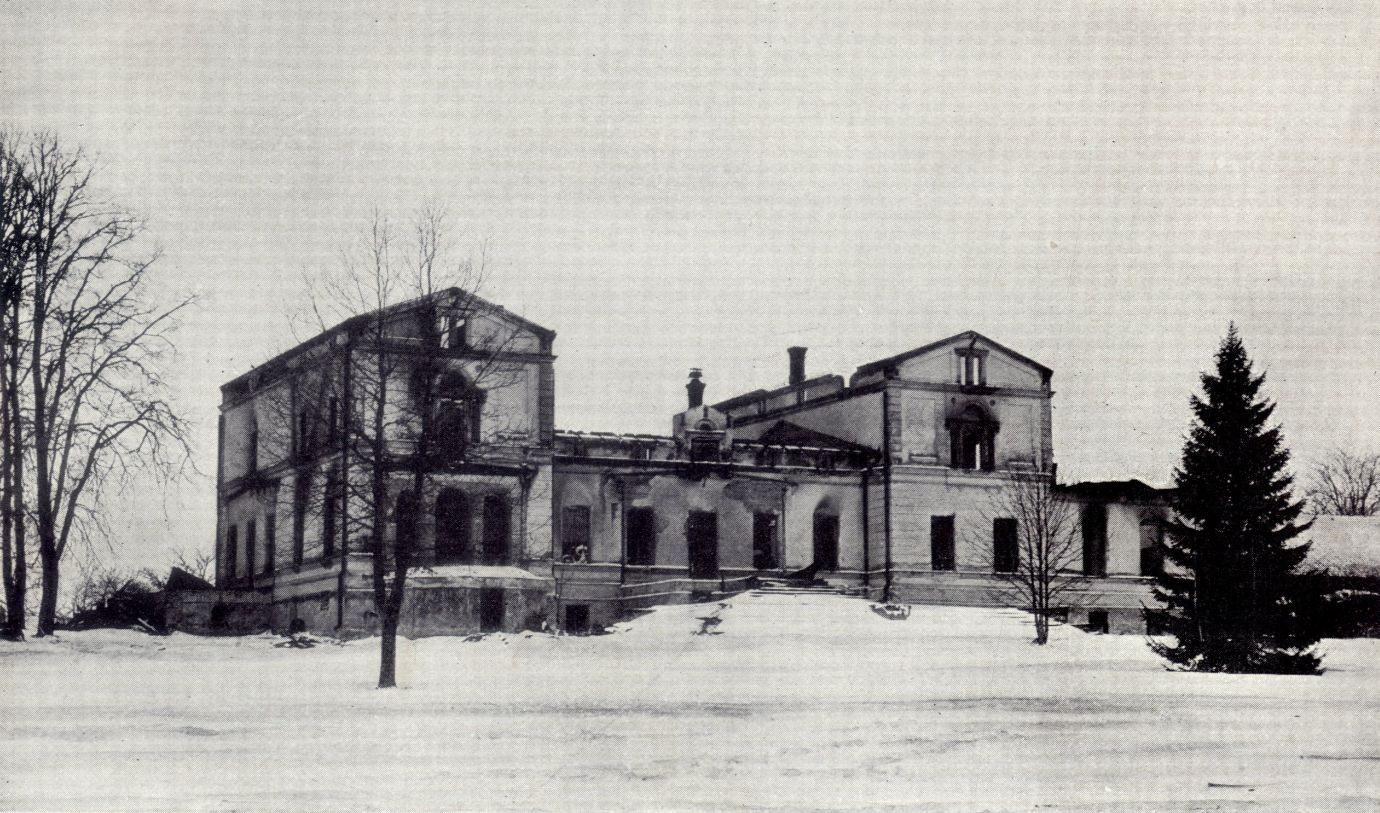 Vērene mõis pärast 1905. a põlengut